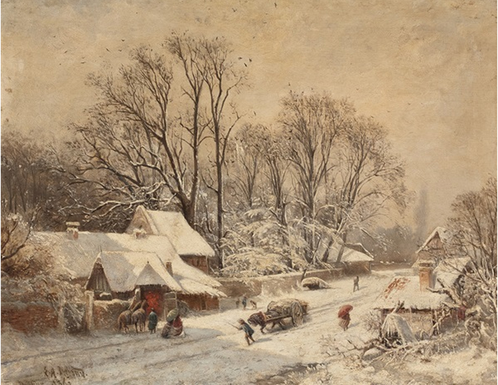 Pempelforterstraße mit Blick auf den Malkastengarten, von Eduard A. Ireland, 1860